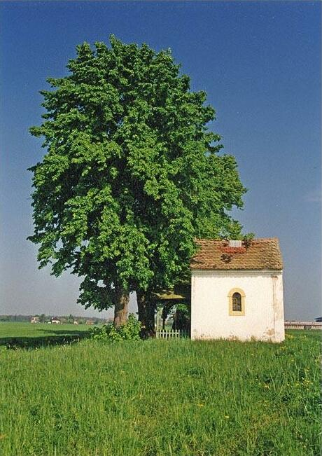 Památné lípy u kapličky Panny Marie Lurdské a "zázračné studánky" u obce Mžany, okres Hradec Králové.